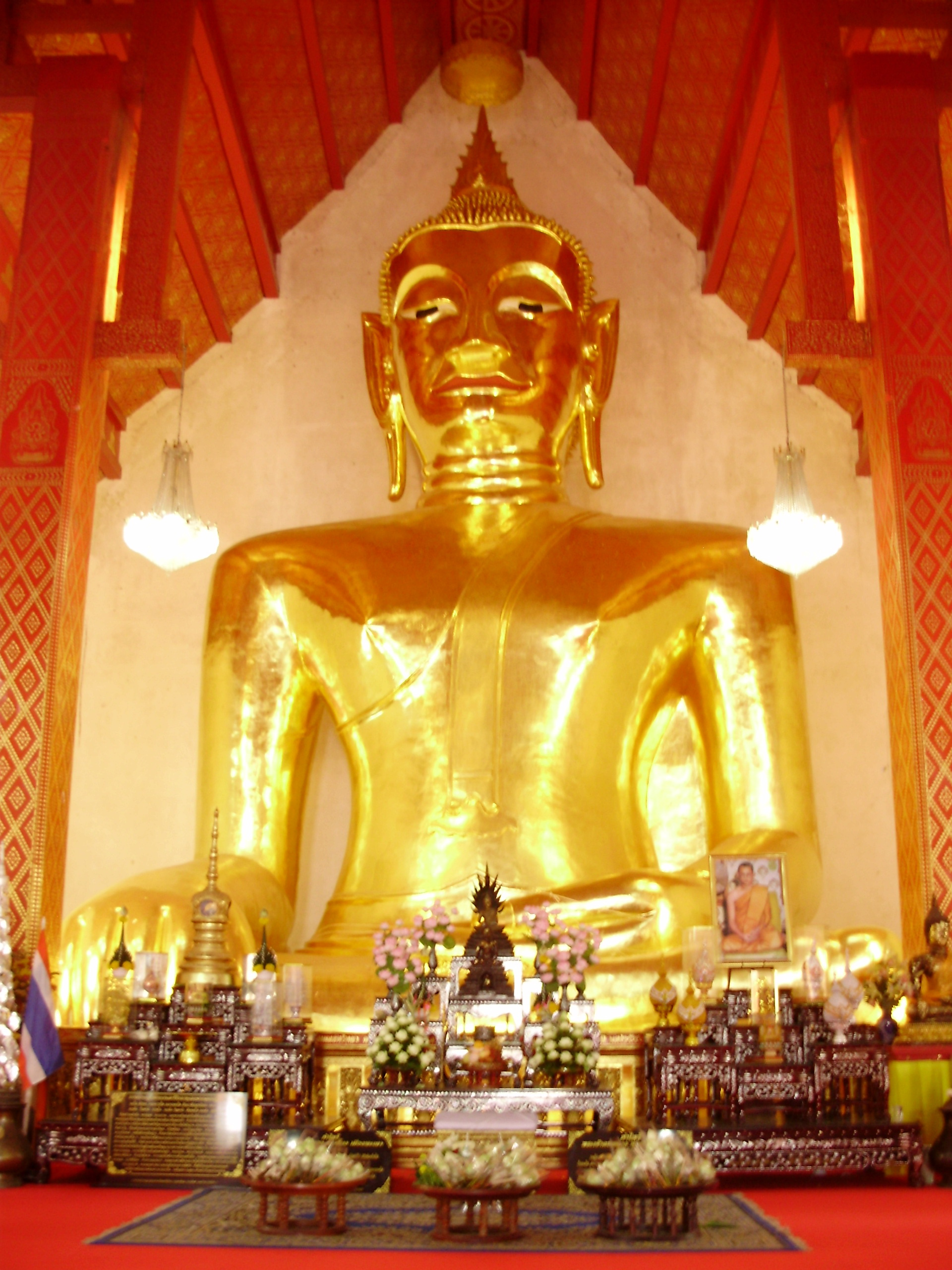 วัดศรีโคมคำ (วัดพระเจ้าตนหลวง) ต.เวียง อ.เมืองพะเยา จ.พะเยา